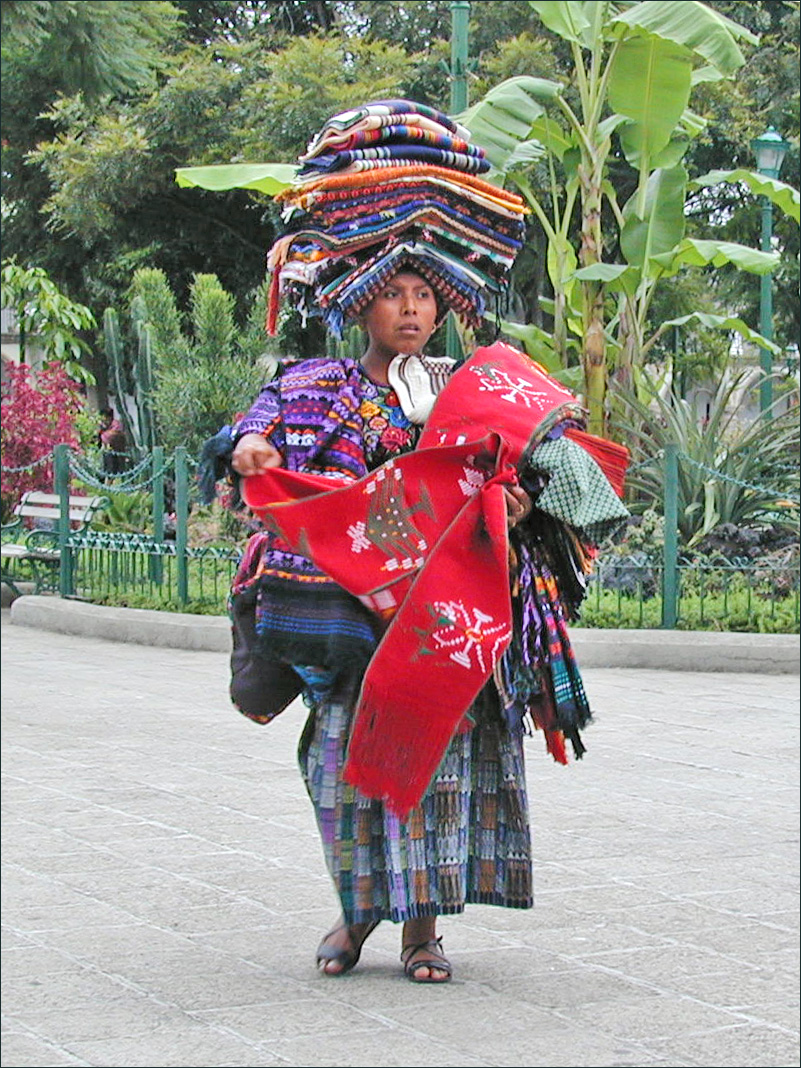 Une marchande de souvenirs sur la grande place d'Antigua, au Guatemala Site de l'auteur sur le Guatemala (2003) Photo 2003